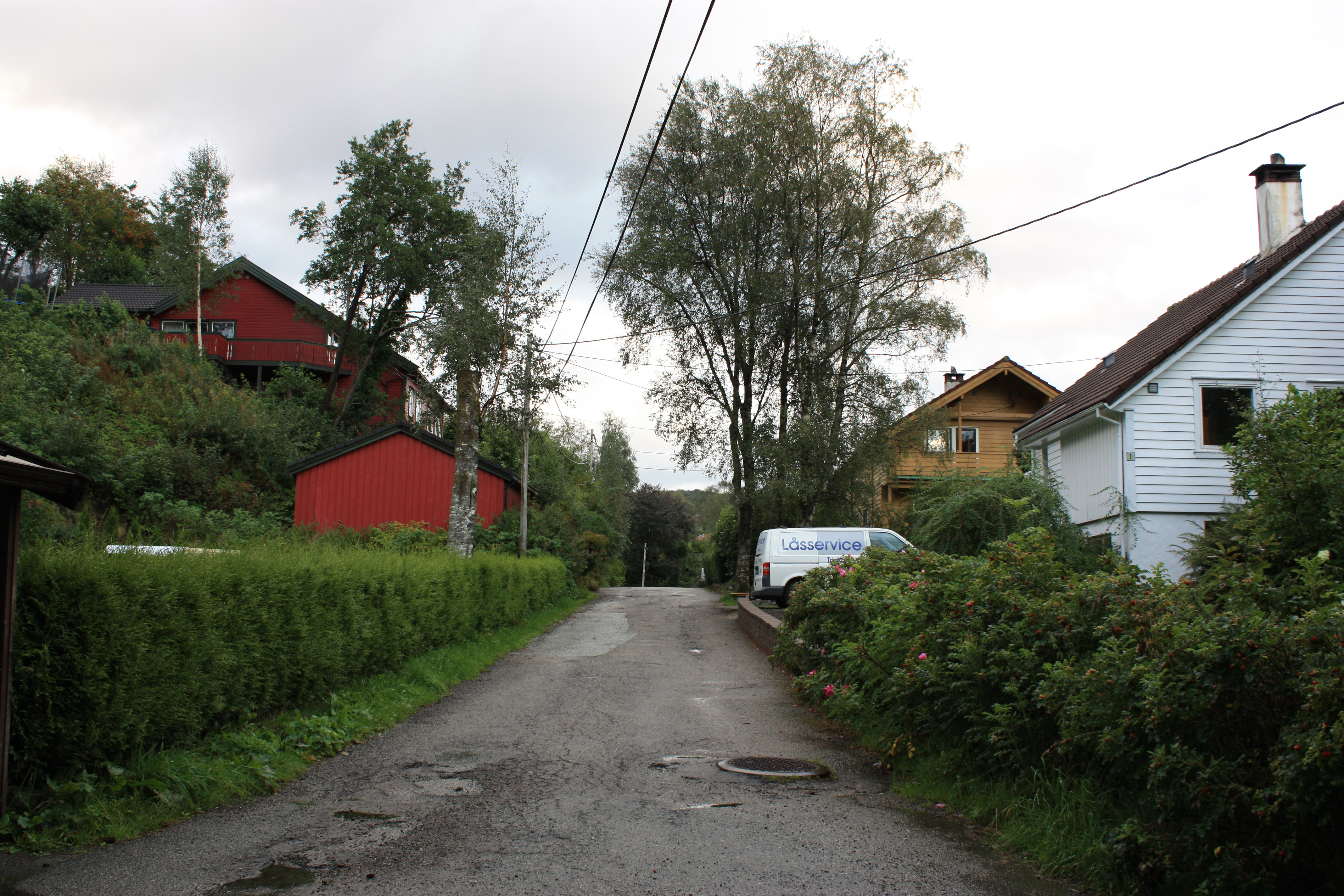 Søndre Beverveien, Fana, Bergen.